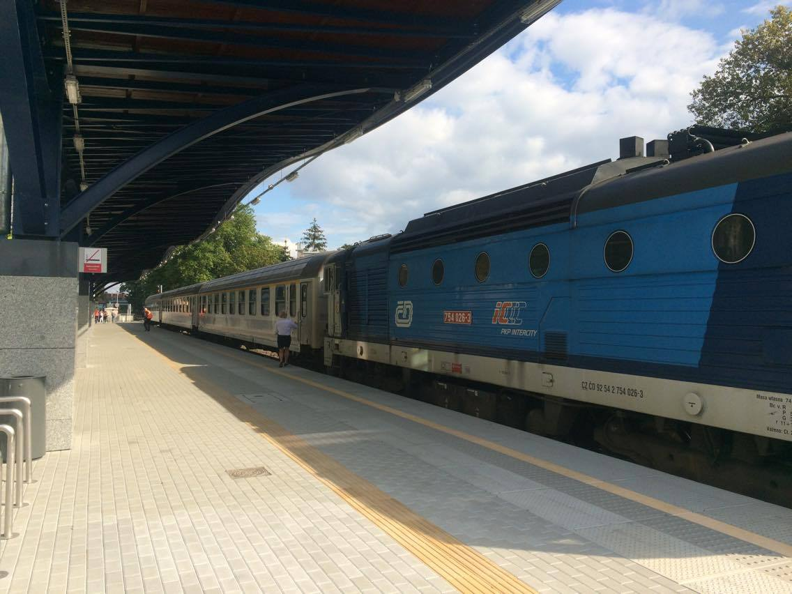 Gorzów Wielkopolski Wschodni